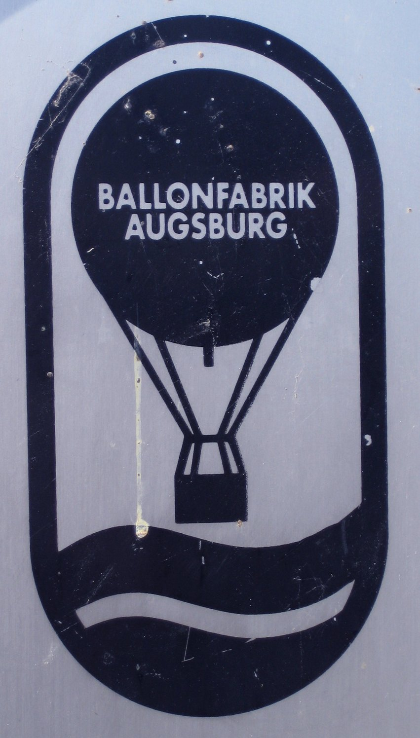 Augsburger Ballonfabrik, das alte Logo am Pförtnerfenster